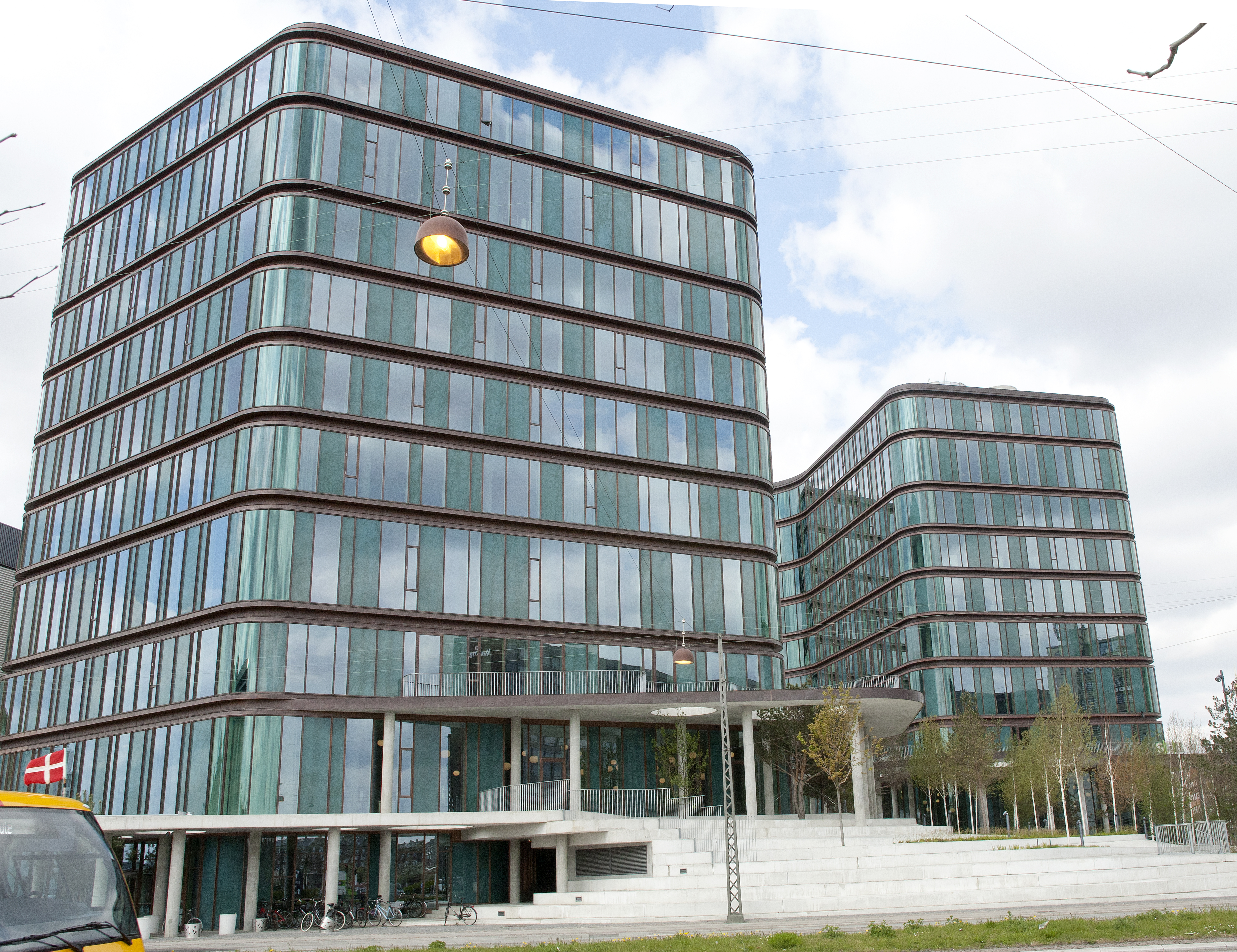 SEB Bank in Copenhagen, Denmark